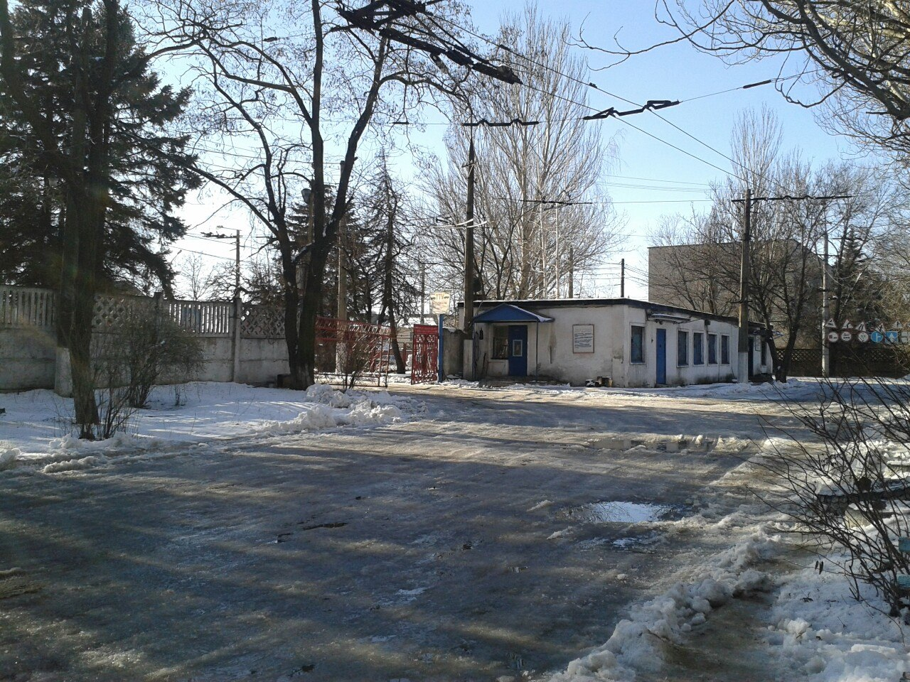 Троллейбусное депо №4 г. Мариуполя